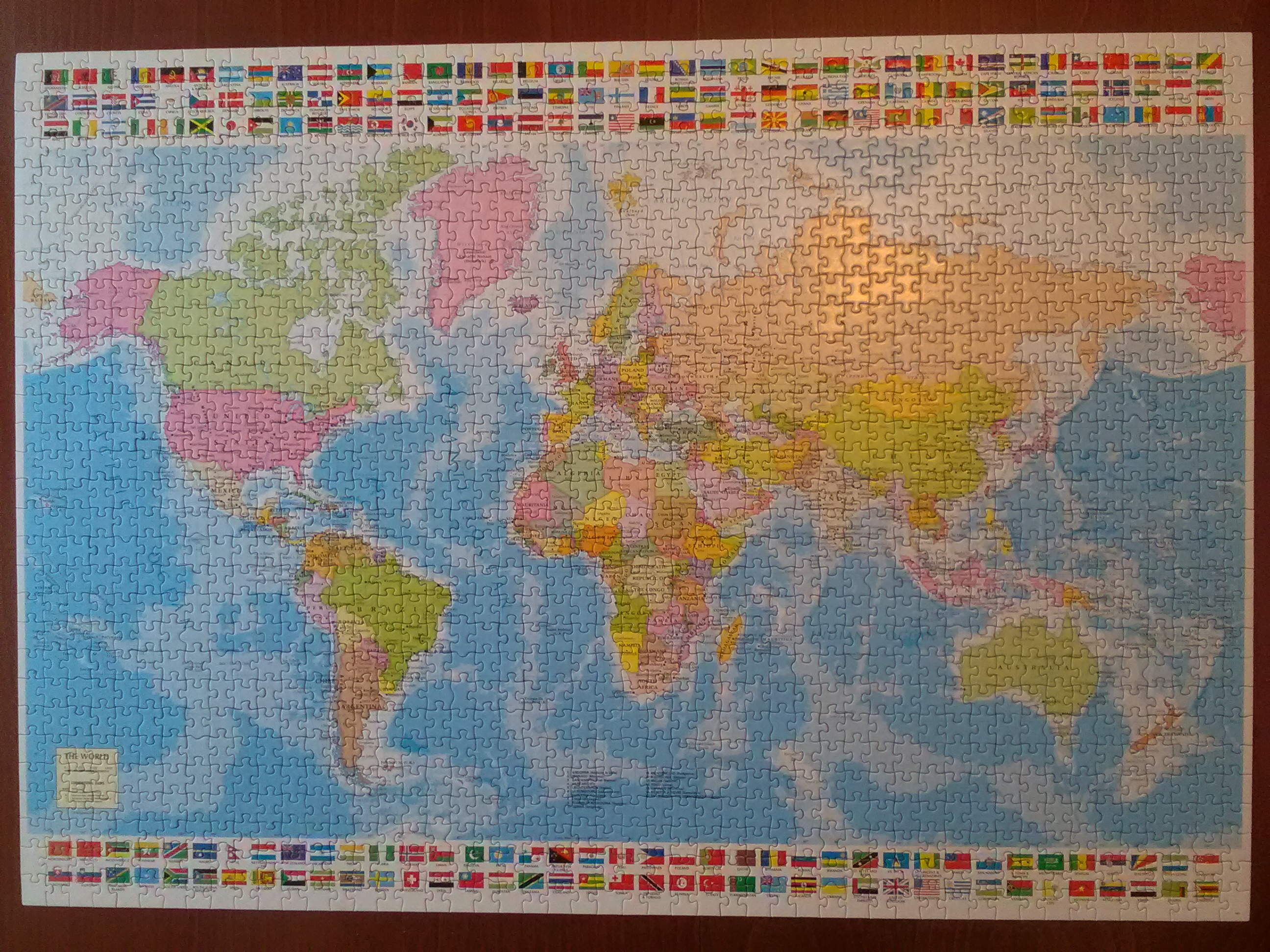 Puzzle, mapa świata.